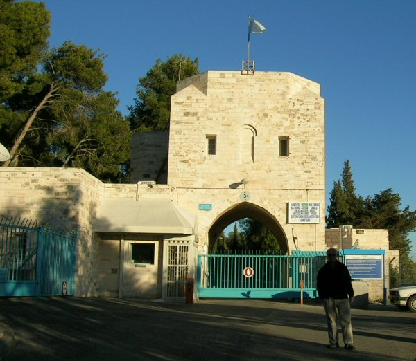 ארמון הנציב